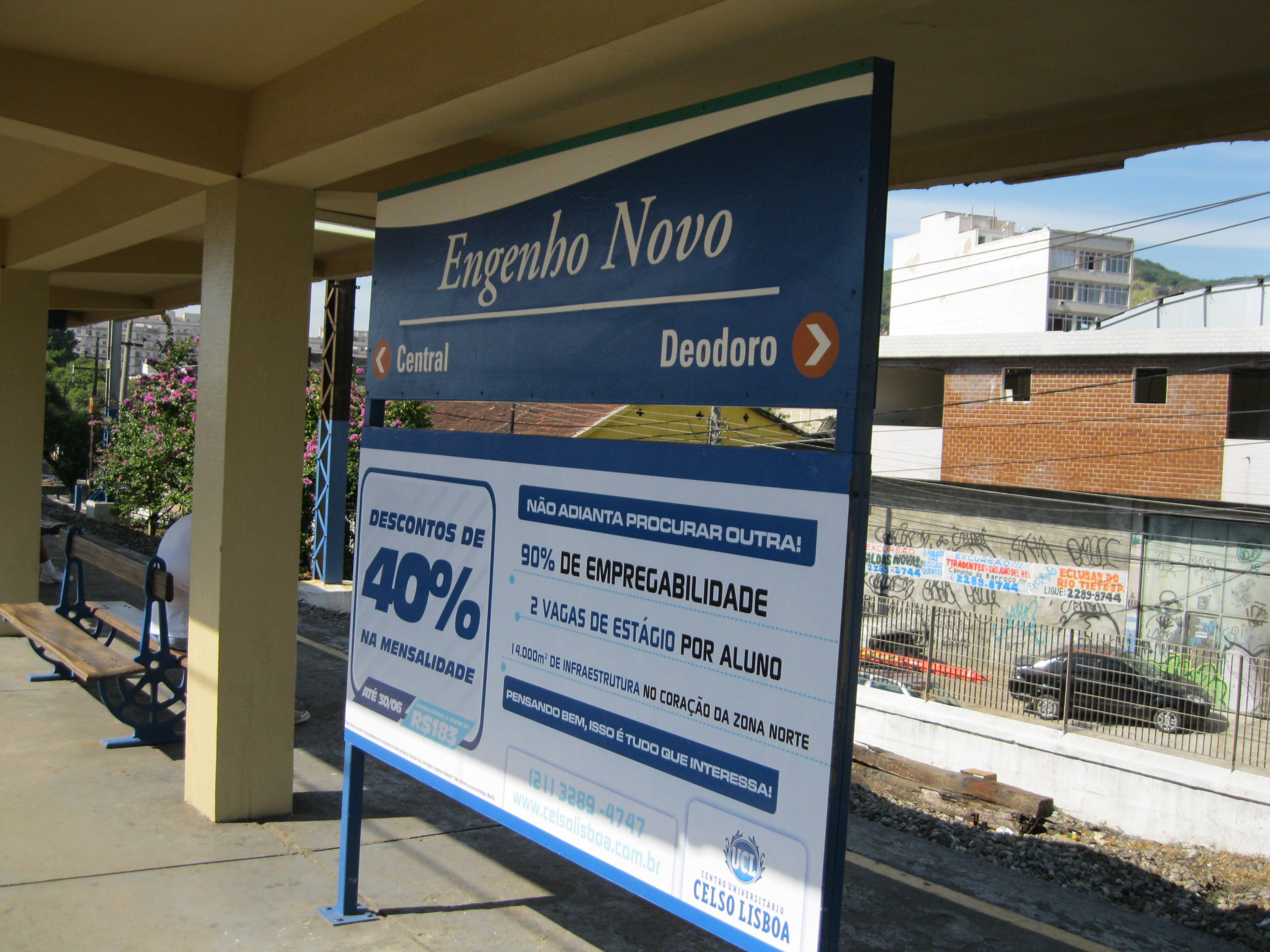 Estação Engenho Novo, no Rio de Janeiro.